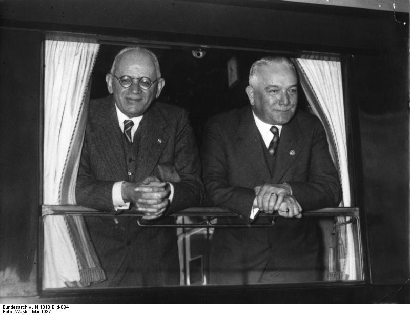 Bernardo Attolico, Konstantin von Neurath Heute vormittag reiste Reichsaussenminister [Konstantin] Freiherr v[on] Neurath in Begleitung des italienischen Botschafters Attolico zu einem Besuch bei dem italienischen Aussenminister Graf Ciano nach Rom. Unser Bild zeigt Reichsaussenminister [Konstantin] Freiherr v[on] Neurath (rechts) und Botschafter [Bernardo] Attolico (links) am Fenster ihres Wagens. Abgebildete Personen: Neurath, Konstantin von Freiherr: Außenminister, Reichsprotektor für Böhmen und Mähren, Deutschland (GND 118786016) Attolico, Bernardo: Botschafter in Deutschland, Italien (GND 11936820X) Information added by Wikimedia users. Dt.-Ital. Außenministertreffen in Rom am 4. Mai 1937